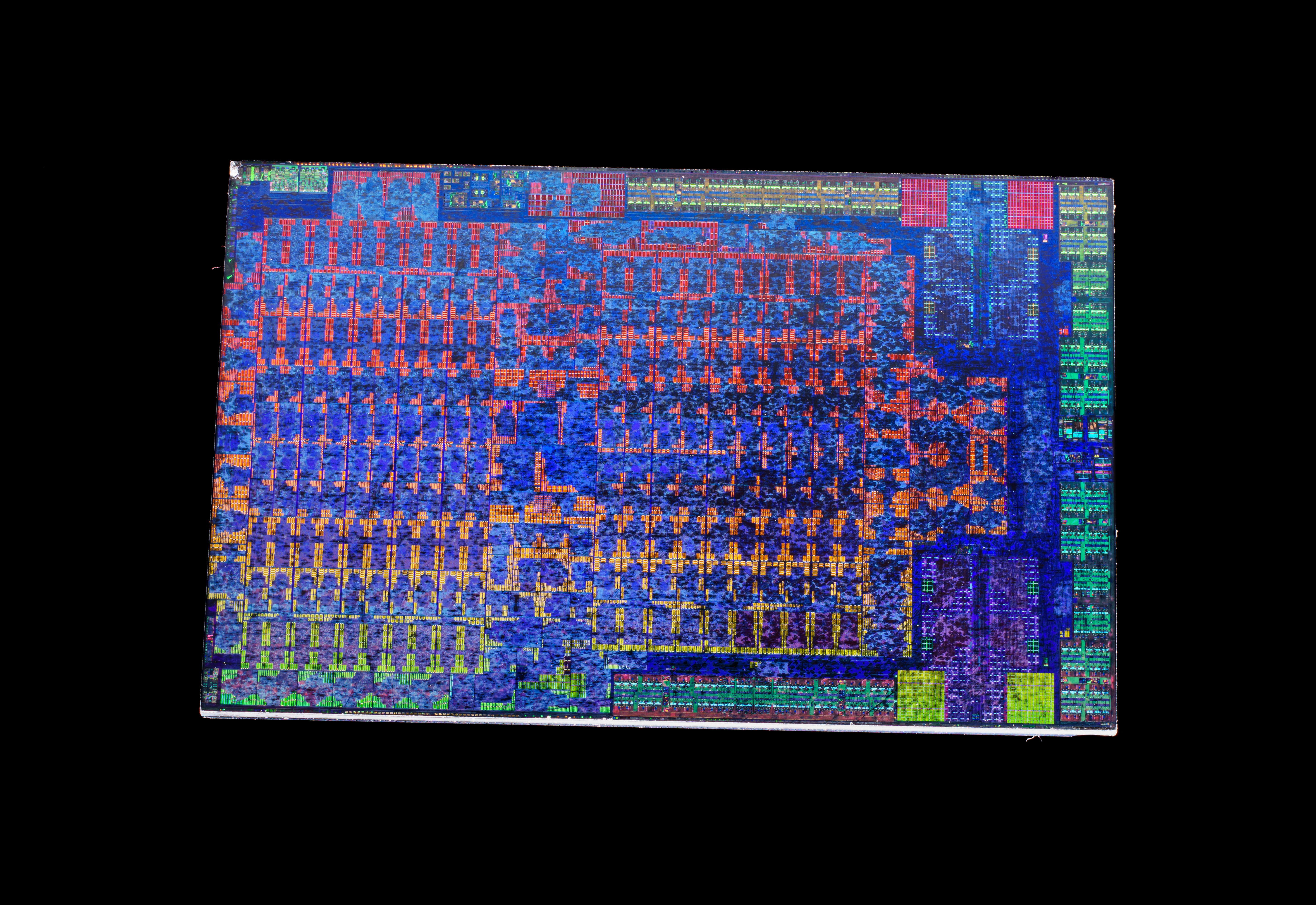 AMD@16nm@Jaguar_Polaris@Neo@Playstation_4_Pro@CXD90044GB___Stack-DSC08867-DSC08882_-_ZS-retouched